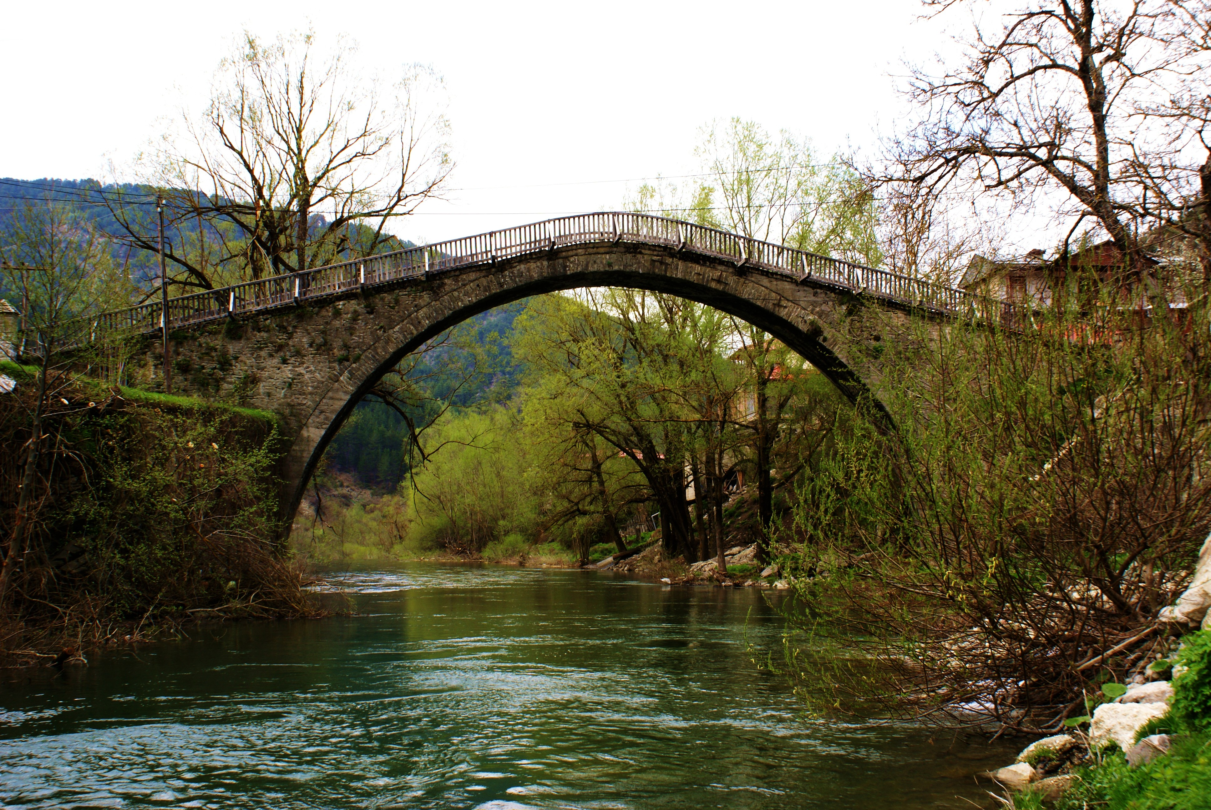 Γέφυρα Βοβούσας«Γέφυρα Βοβούσας»